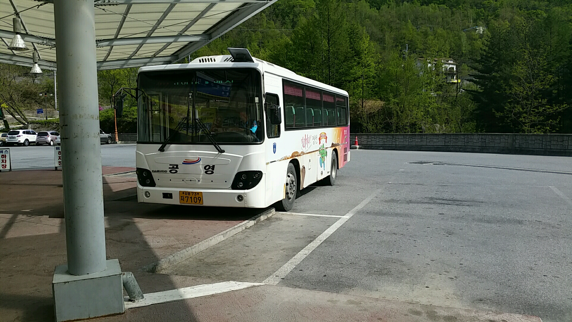 2016년 5월 9일에 촬영된 정선군청에서 운영하는 정선군 공영버스